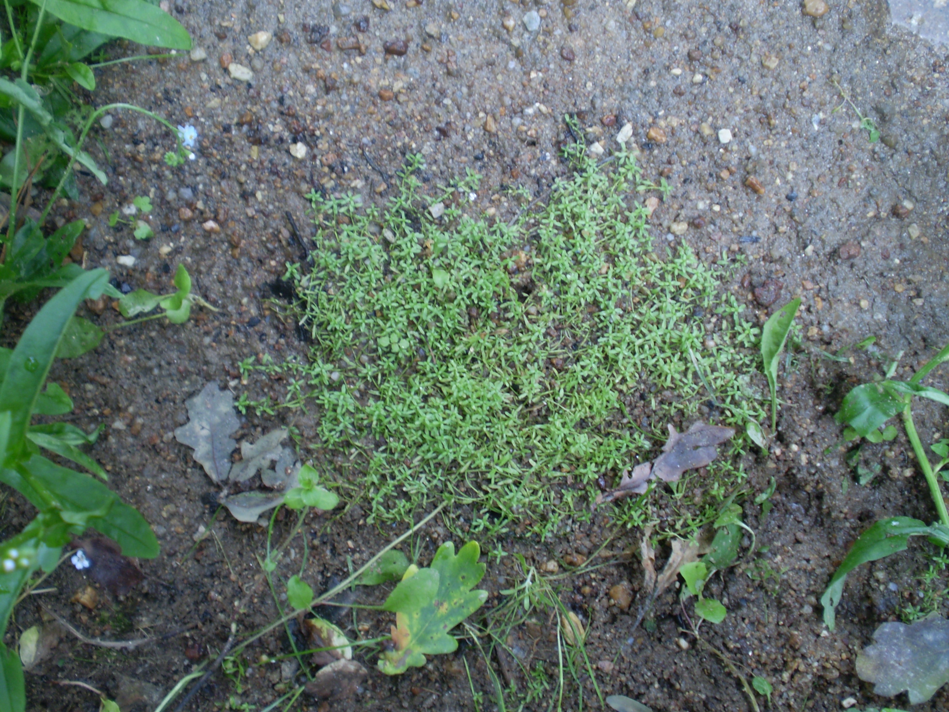 Callitriche hamulata (hvězdoš háčkatý) - terestrická forma na břehu Lužnice